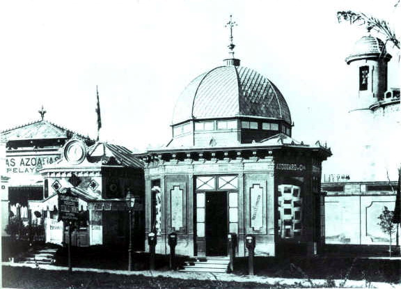 Pavelló del fotògraf Pau Audouard a l'exposició Universal de 1888 a Barcelona, de la que era el fotògraf oficial. Postal de Pau audouard